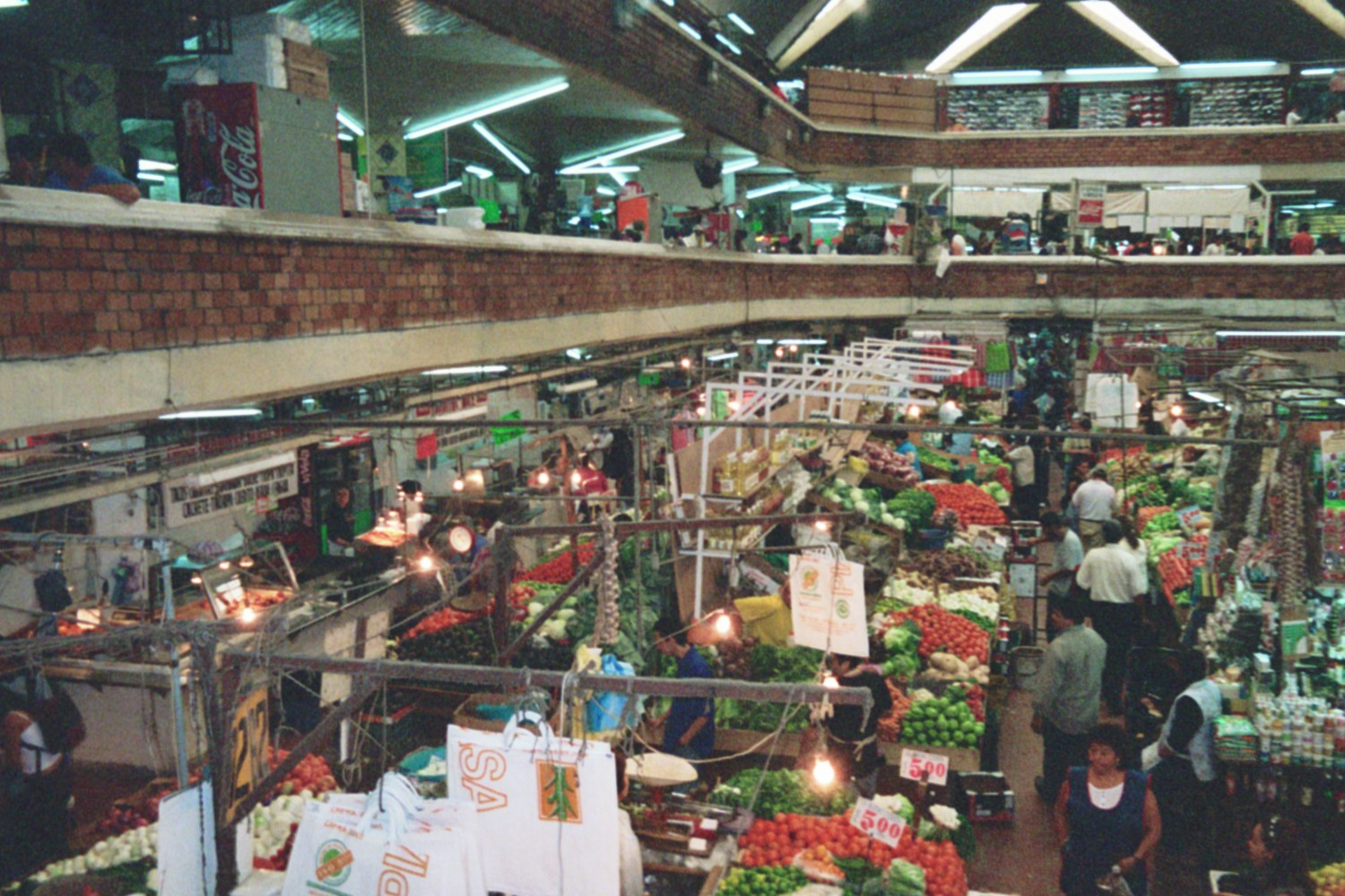 Marketplace in Guadalajara, Jalisco, Mexico.